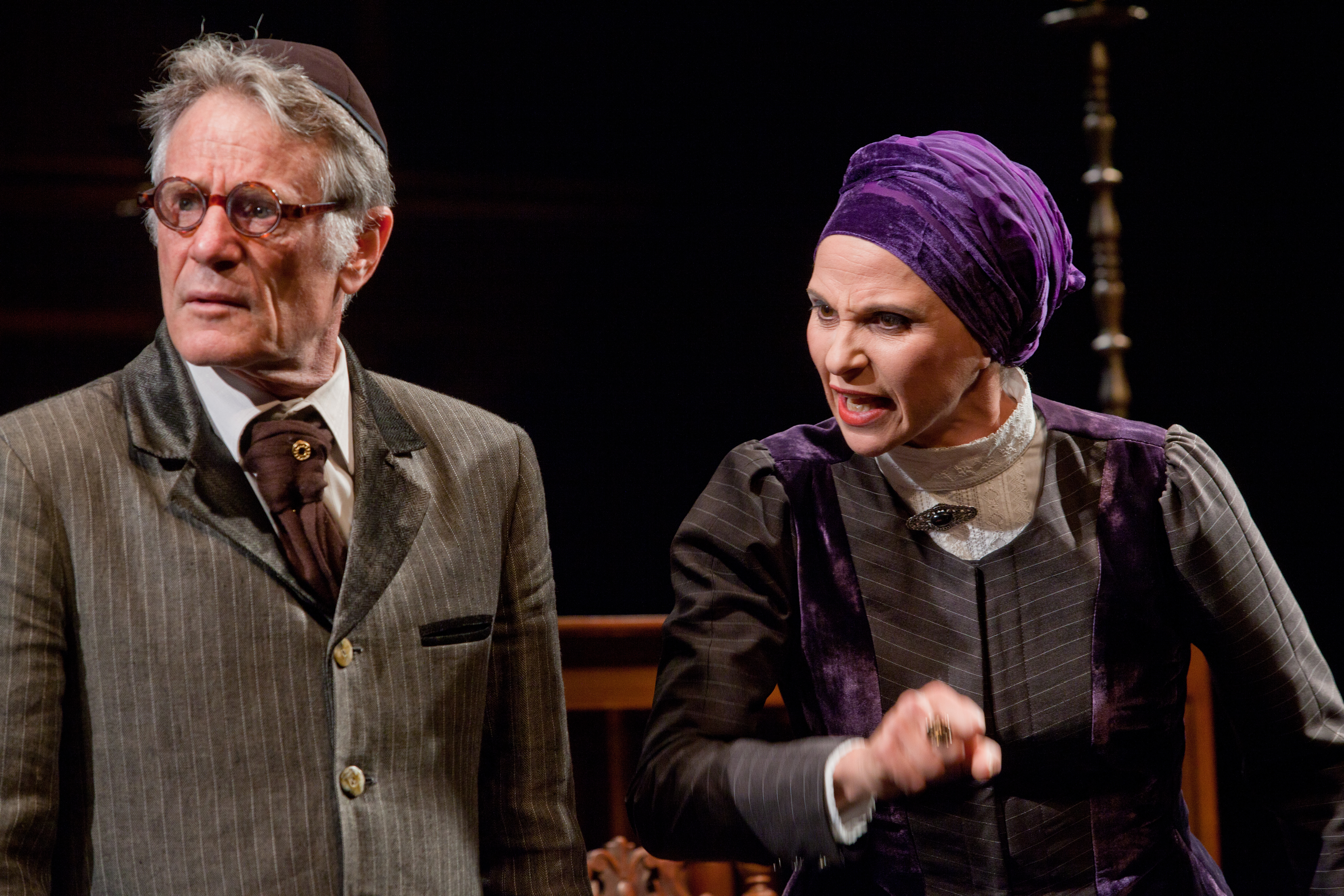 כרמית מסילתי-קפלן ואבי פניני בהצגה "ירושלים החדשה", בבימויו של סיני פתר, תיאטרון החאן, 2012